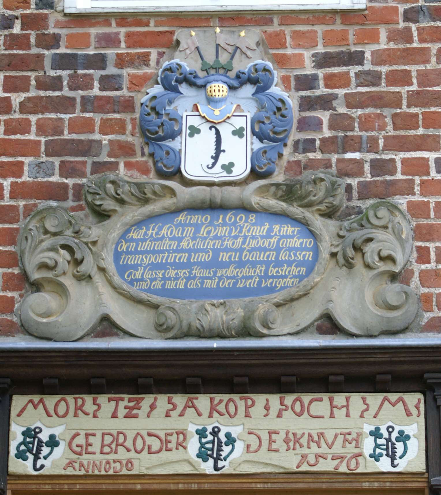 Ludorf Herrenhaus (Hotel) Inschrift und Wappen der Familie von Knuth über dem Haupteingang